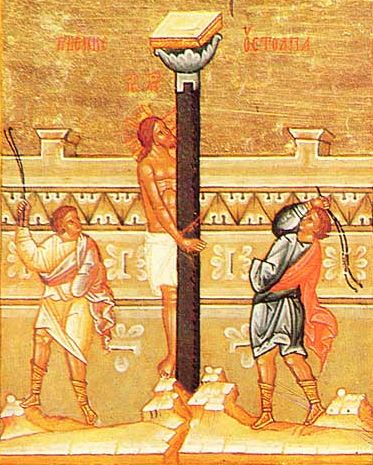 Бичевание Христа. Фрагмент новгородской двусторонней иконы-таблетки